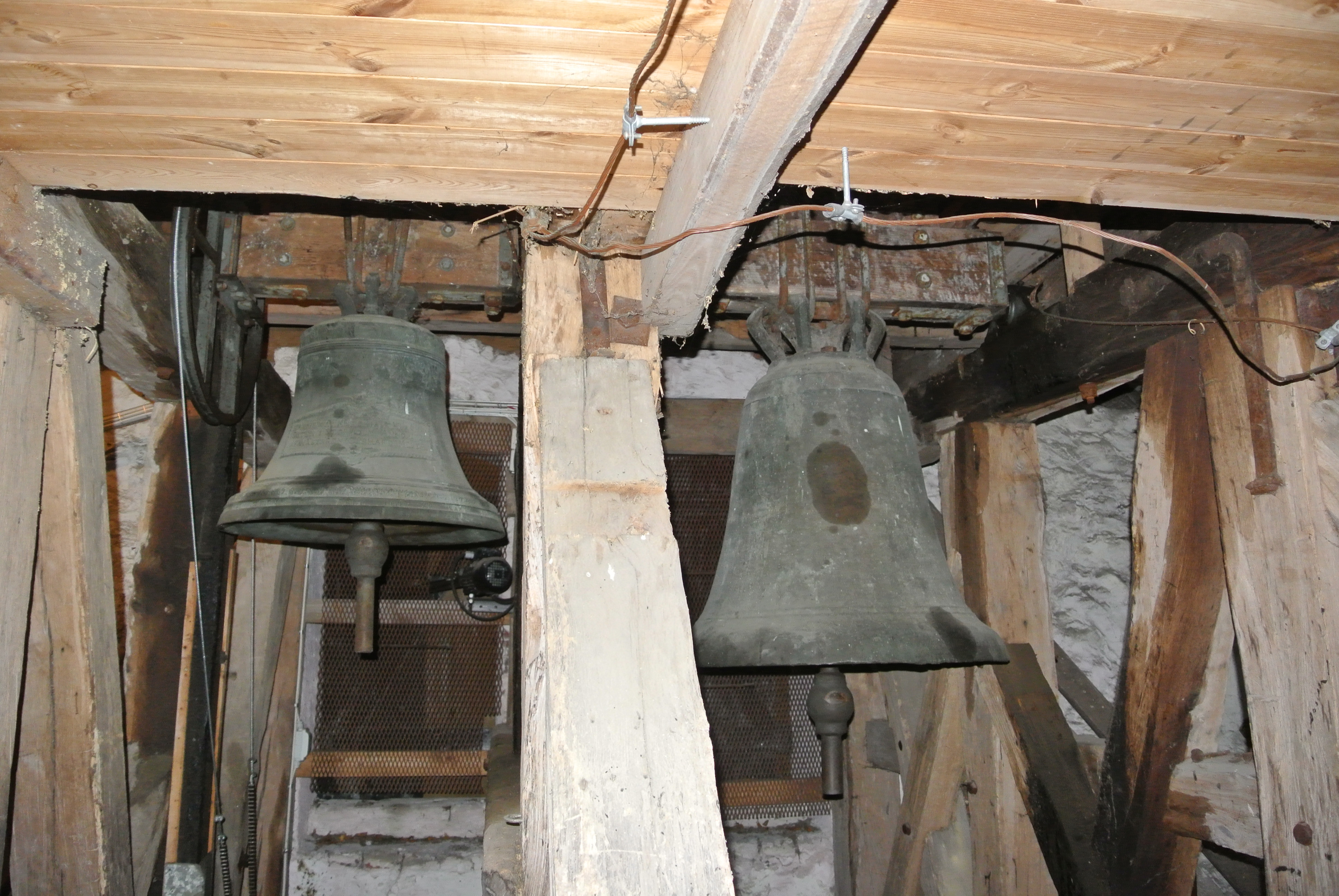 De 2 klockorna i Vankiva kyrka. Till vänster hänger lillklockan från 1728 och till höger storklockan från 1100 talet som är äldst i Skåne